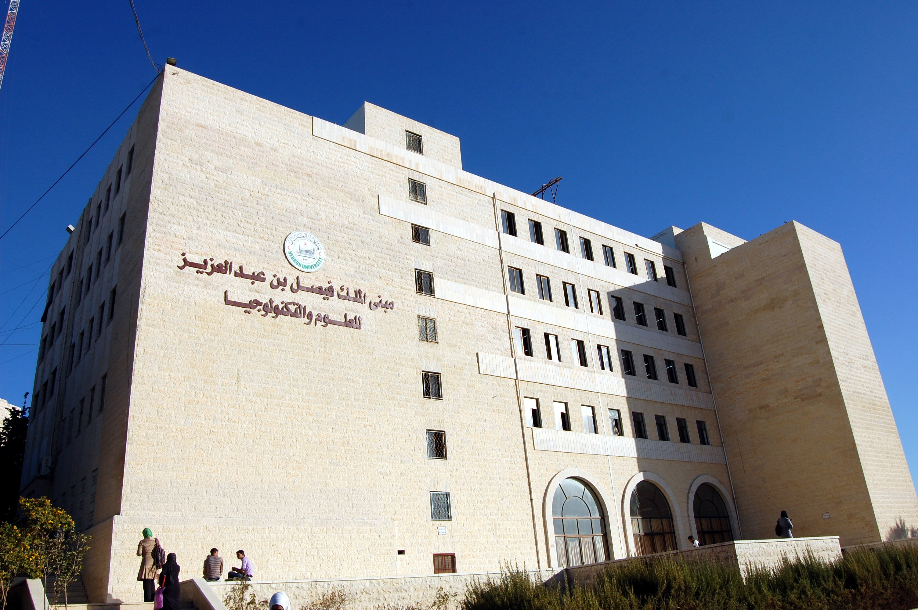 Università di Hebron